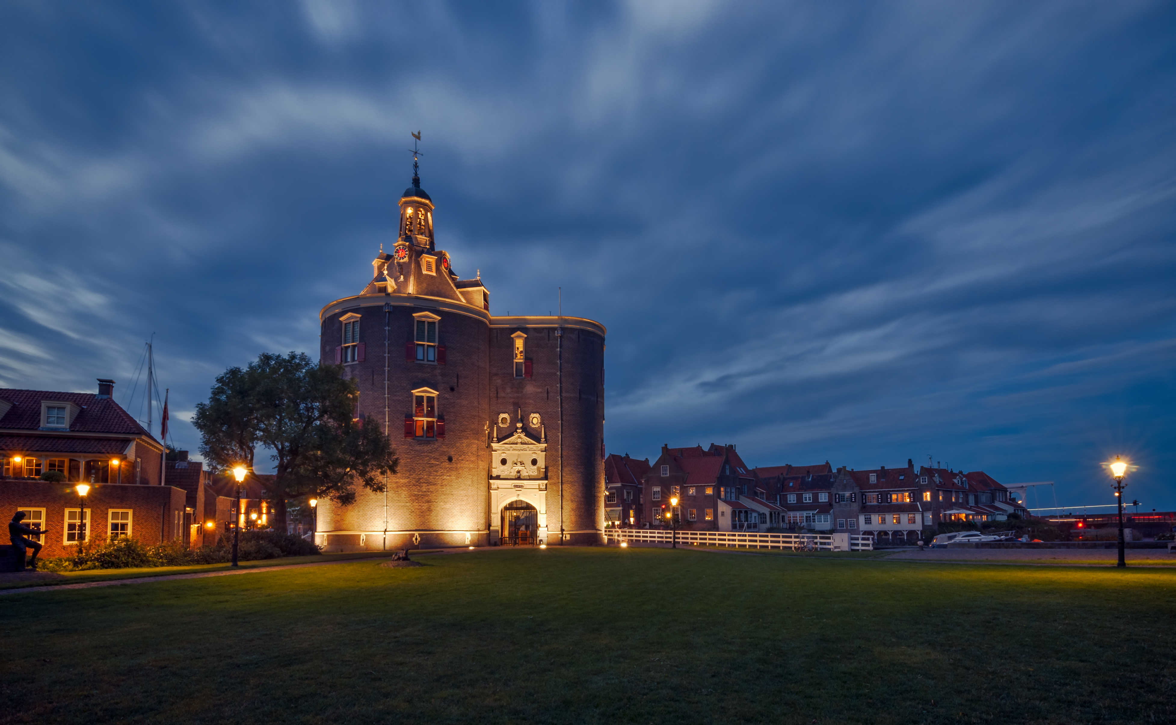 Drommedaris in Enkhuizen